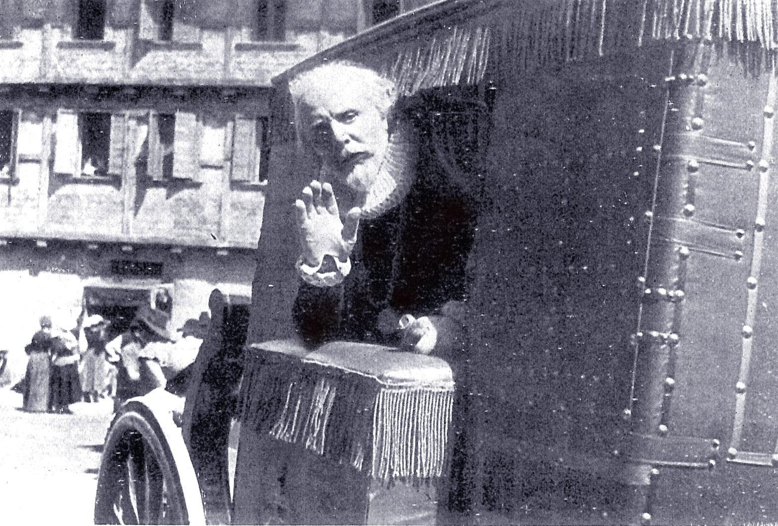 Enzo Biliotti (il governatore Ferrer) ne "I promessi sposi" (Camerini, 1941